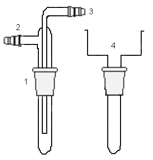 Cold finger.png